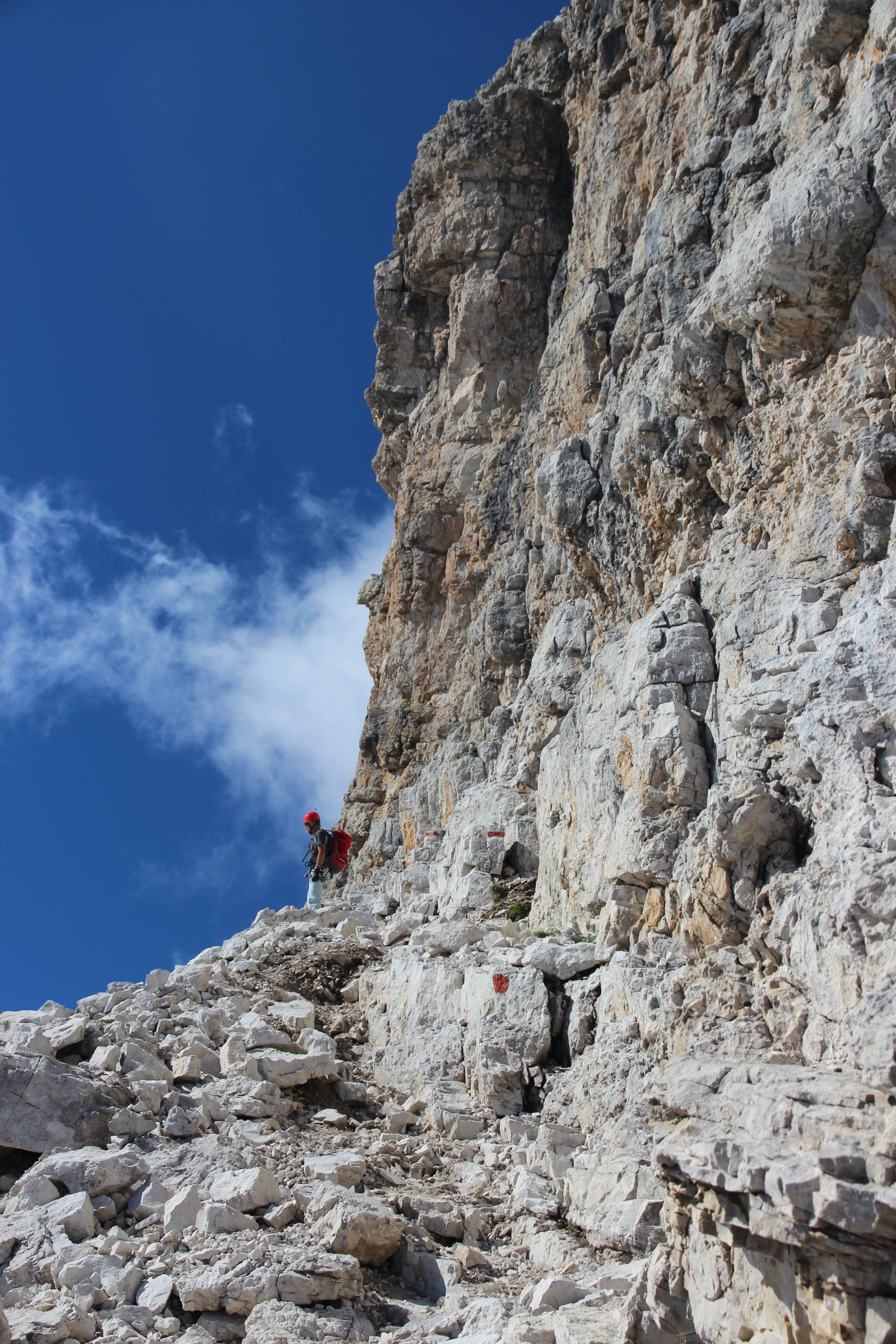 Vire dans la via ferrata delle Bocchette (Dolomites du Brenta) - descriptif dans le livre de Pascal Sombardier (éditions Glénat) ou